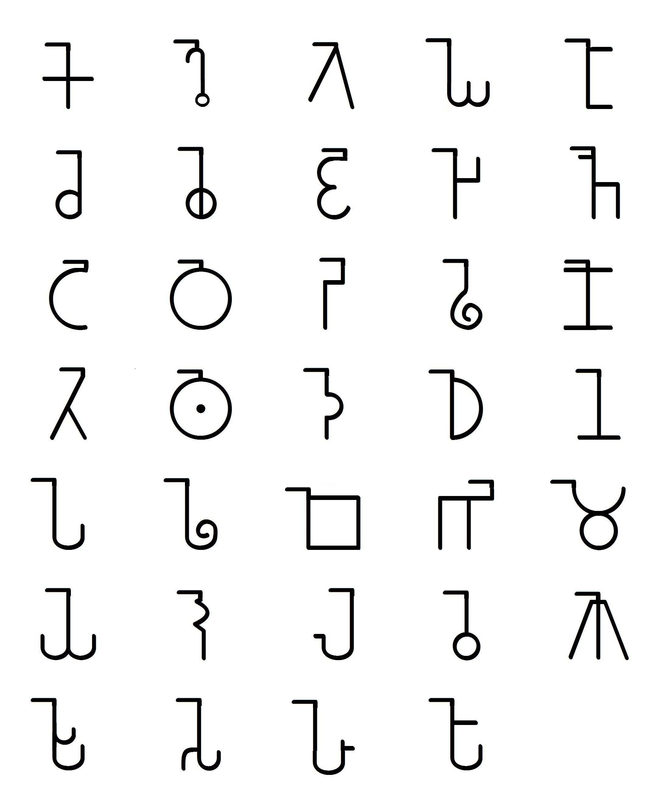 ब्राम्हि व्यंजनांचे ए-कार